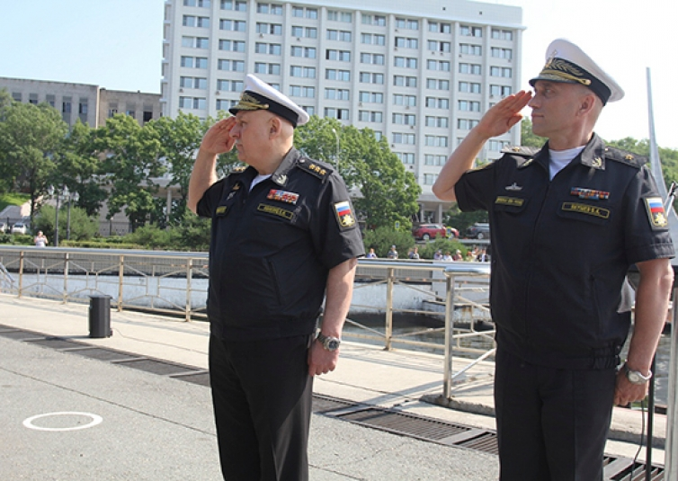 Командующий ТОФ адмирал Сергей Авакянц представил личному составу Приморской флотилии разнородных сил нового командующего объединением контр-адмирала Владимира Якушева